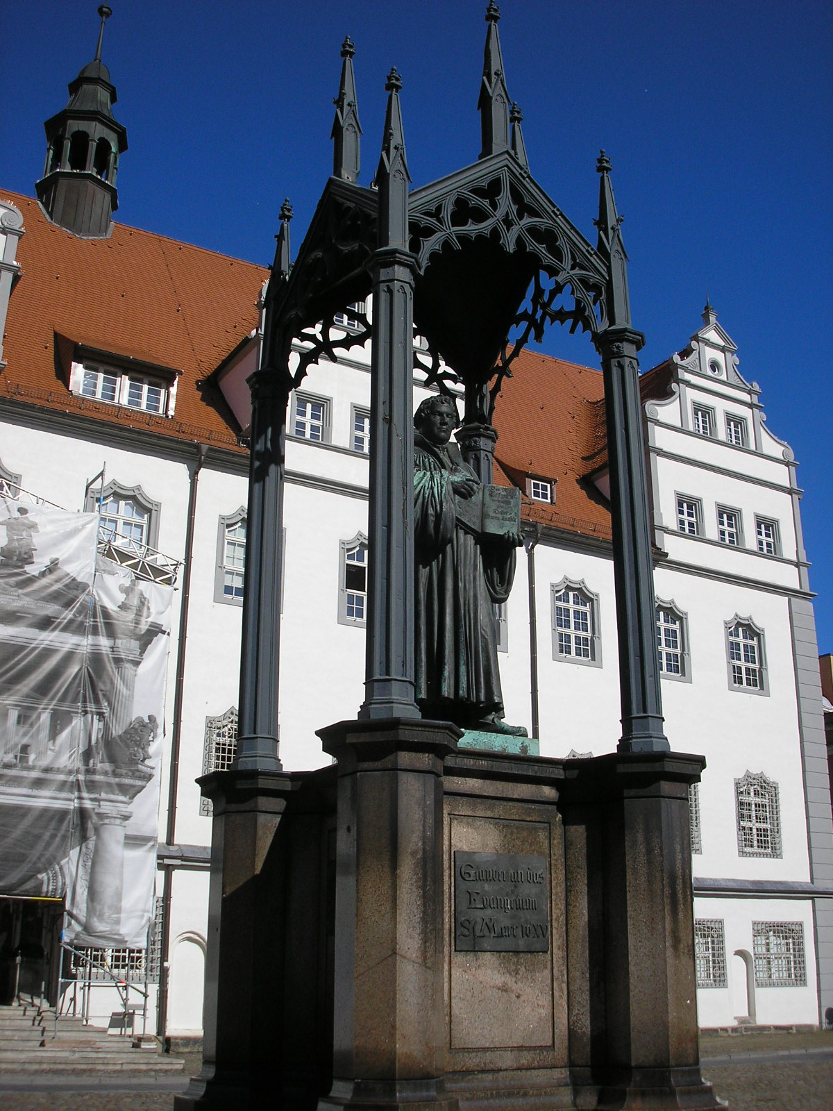 Das Luther-Denkmal auf dem Wittenberger Marktplatz.